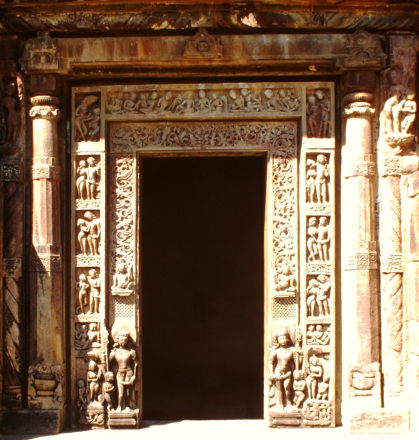 Nachna, Parvati-Tempel, Türportal (1999)